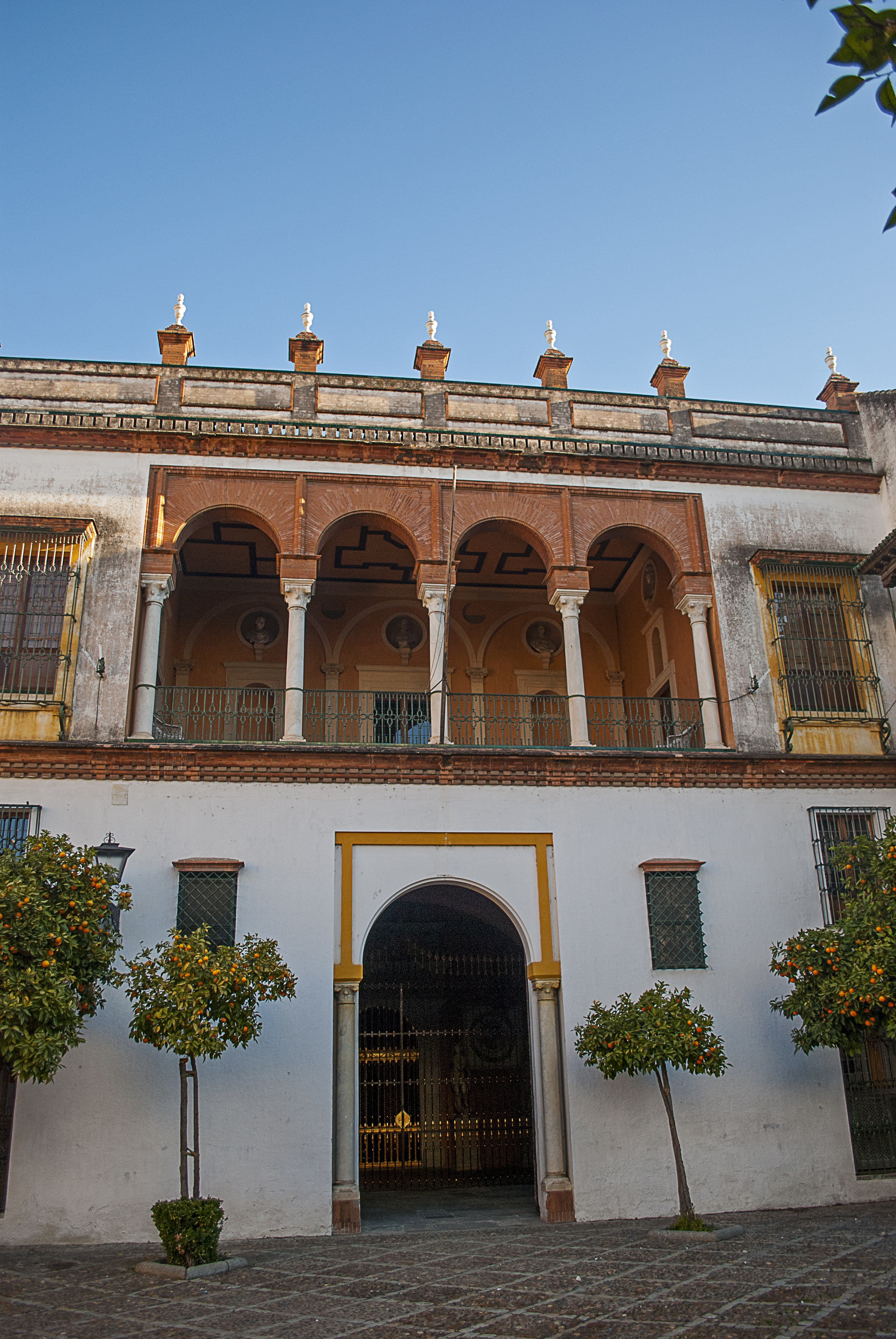 Fachada de la Casa de Pilatos. Sevilla.